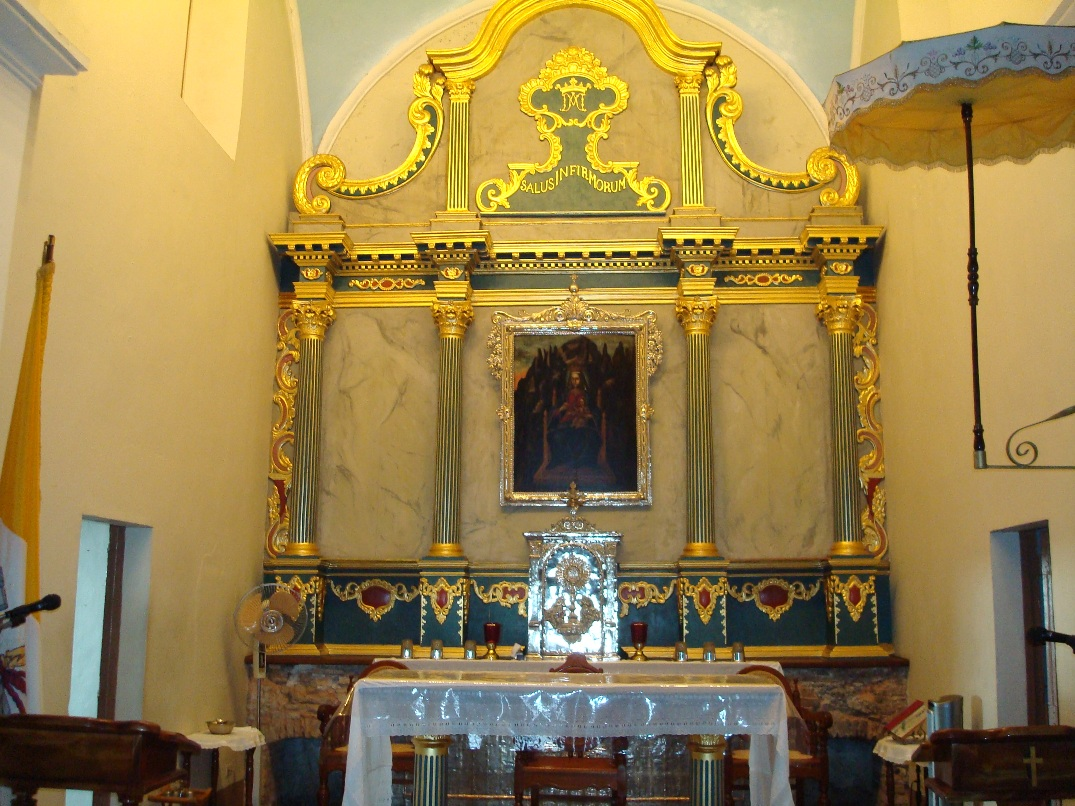 Altar de la Basílica Menor de Hormigueros